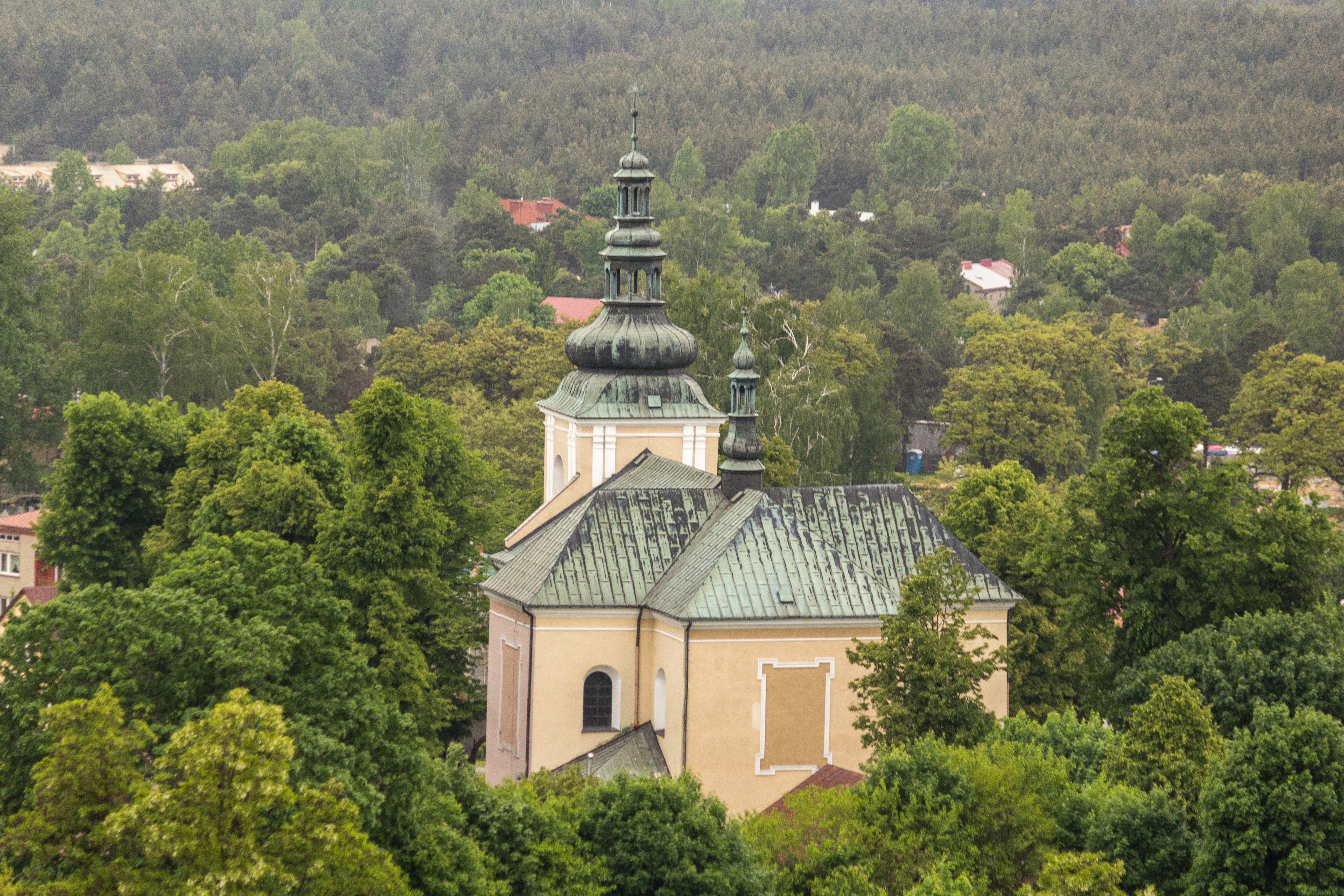 Kościół św. Jana Chrzciciela w Olsztynie widziany z zamku w Olsztynie